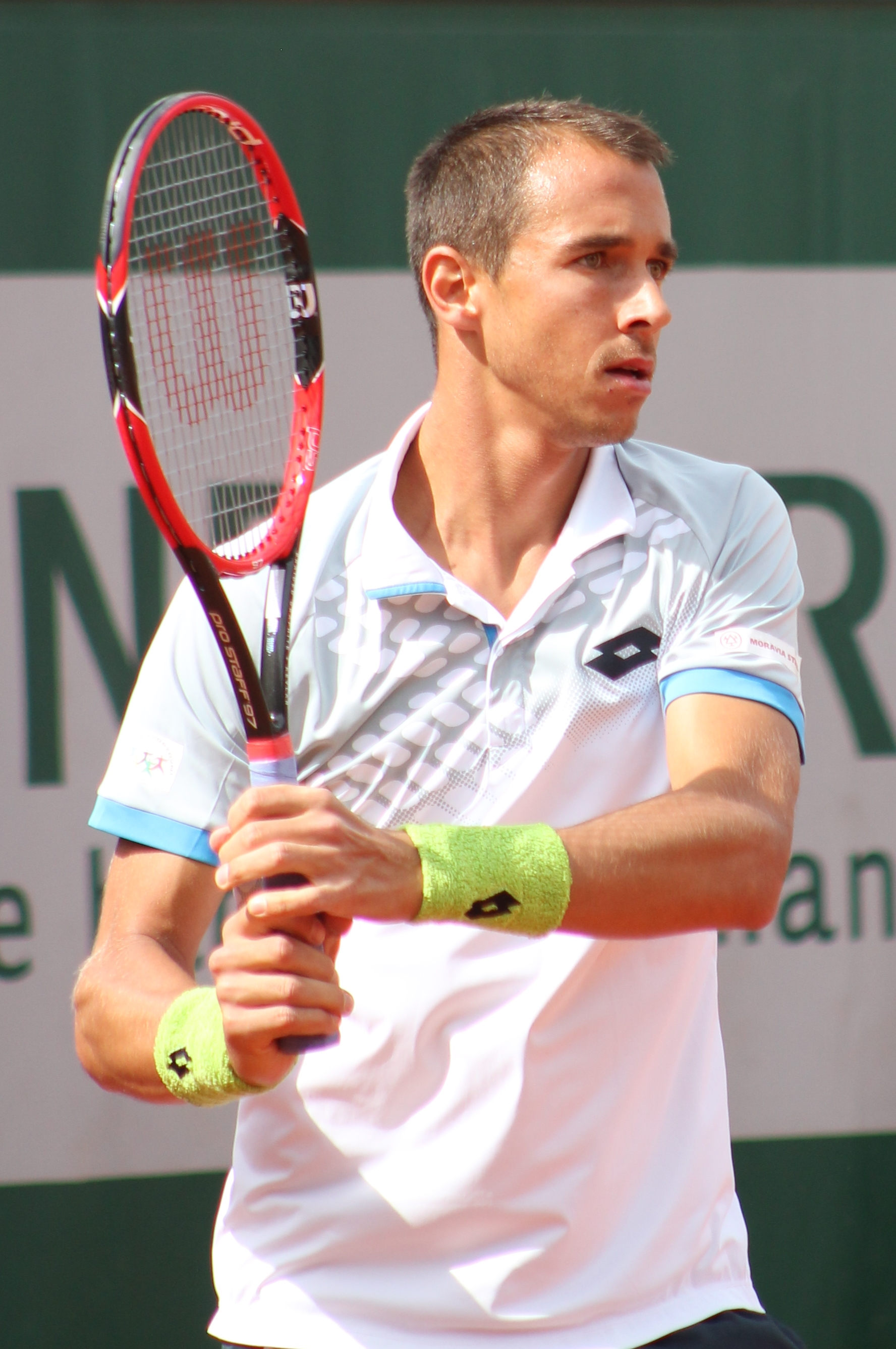 Rosol RG15 (4)